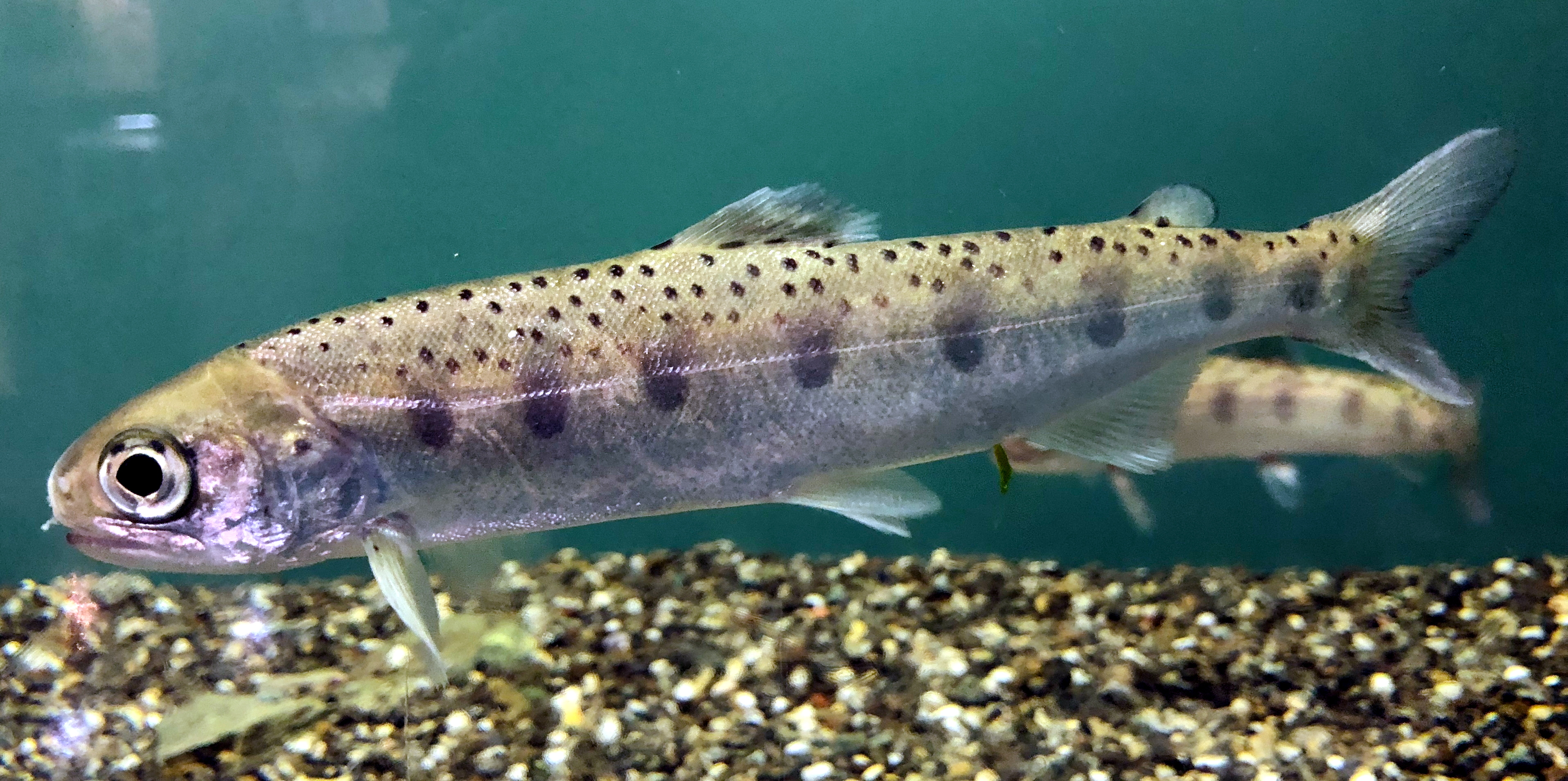 ビワマスの幼魚。滋賀県立琵琶湖博物館飼育展示個体。